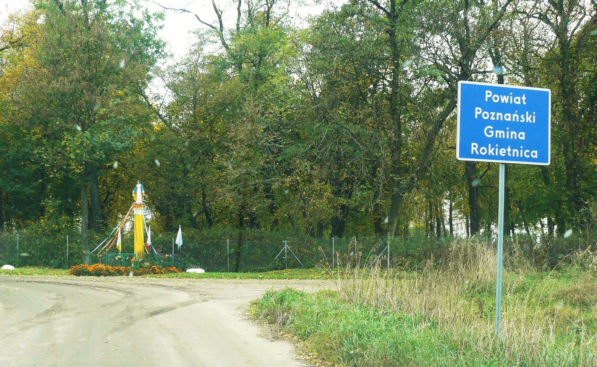 Żydowo - wjazd od str. Sepna.